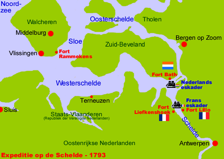 Kaart Expeditie op de Schelde 1793